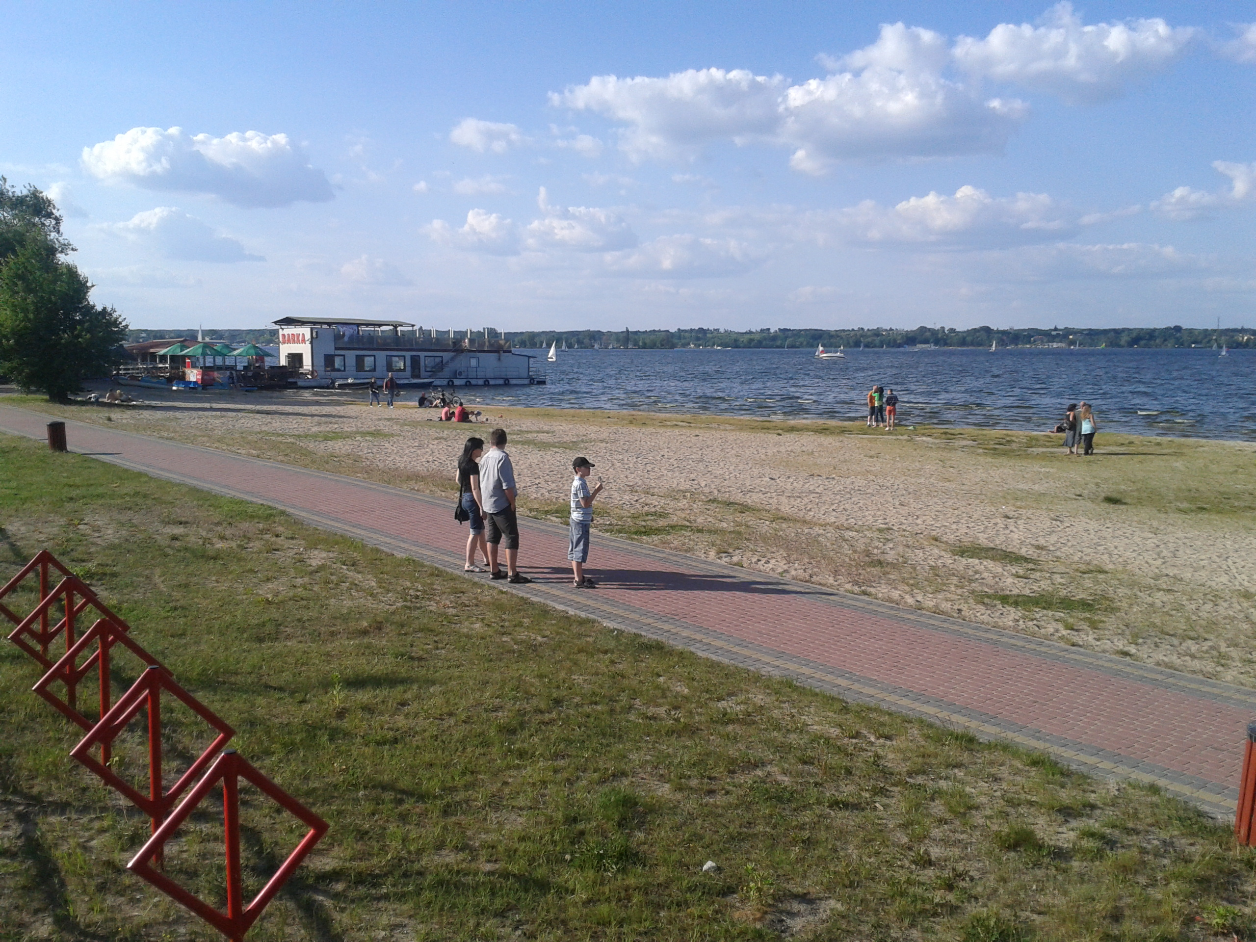 Plaza w Nieporecie